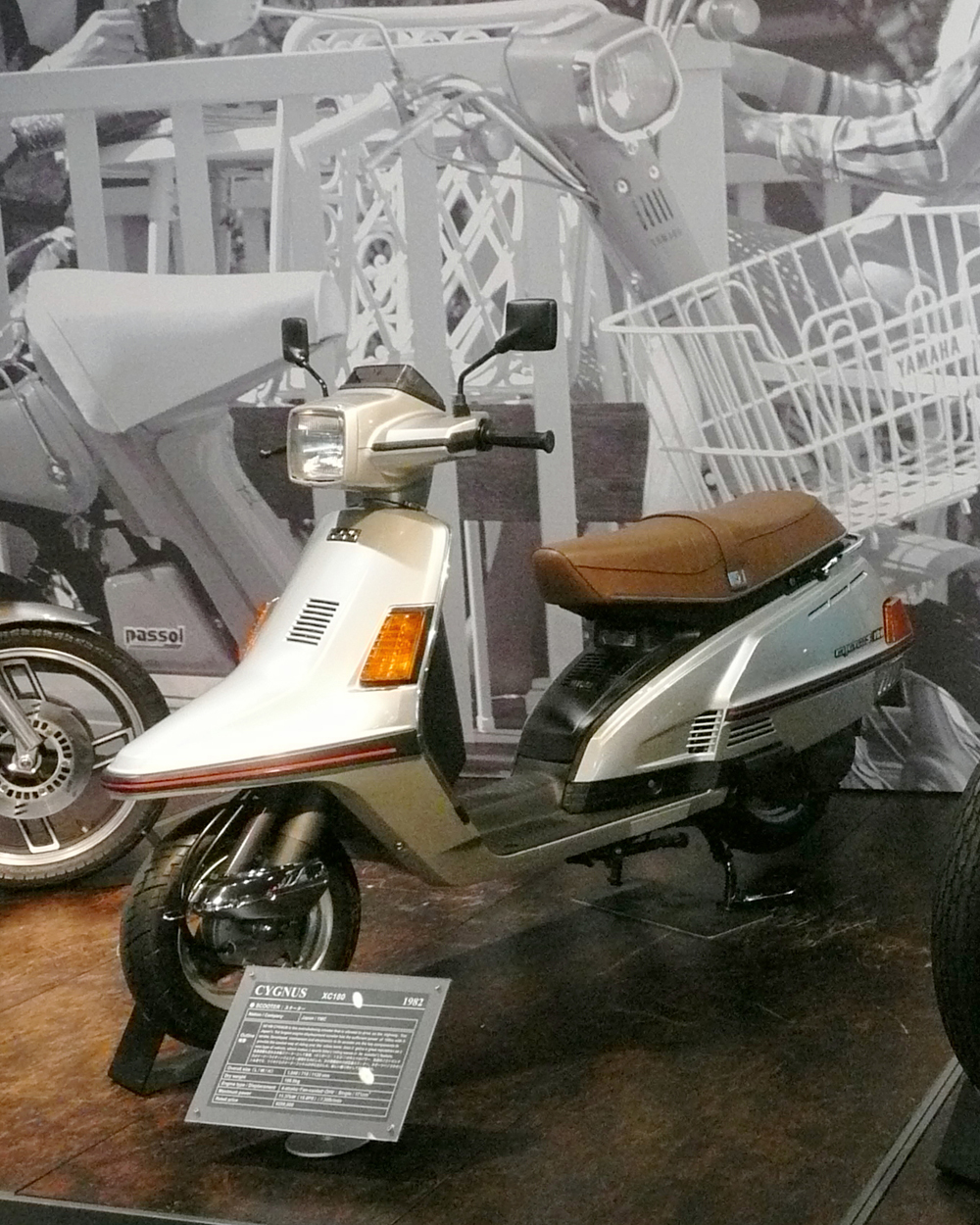 ヤマハ・シグナス（CYGNUS） XC180 1982年 ヤマハコミュニケーションプラザにて撮影